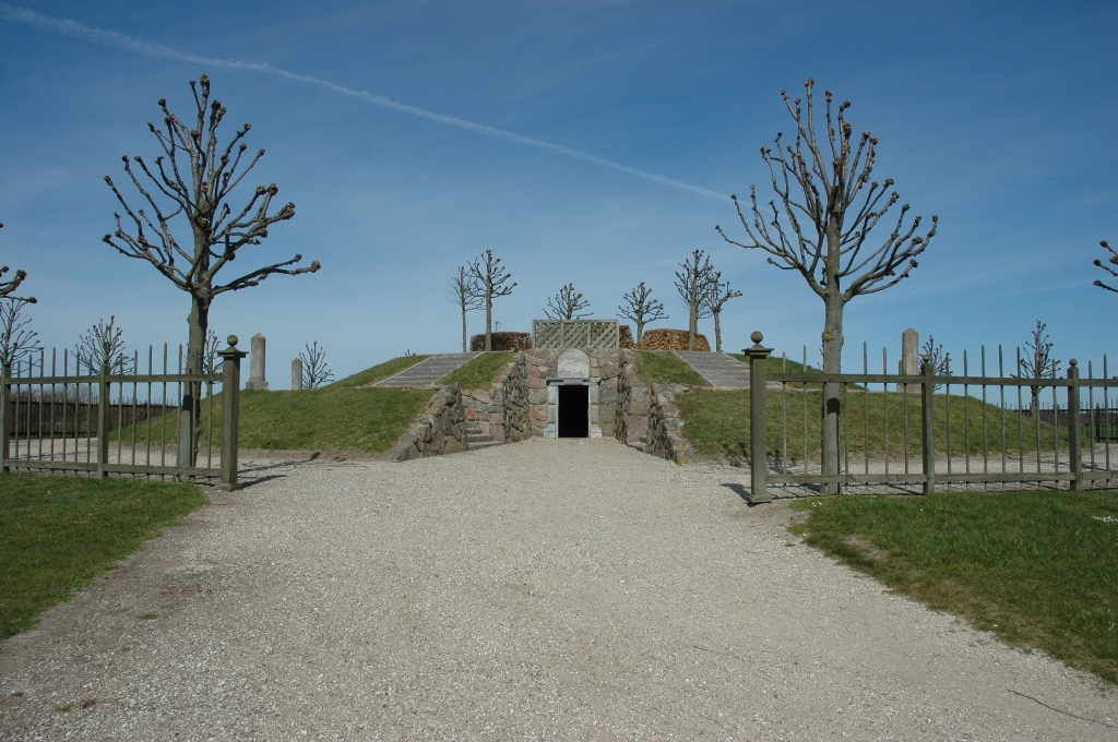 Julianehøj, 3630 Jægerspris